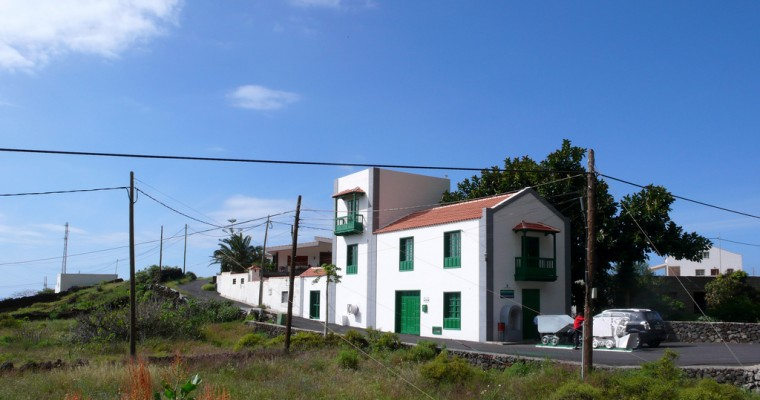 Este archivo representa el pozo de los padrones en el hierro, canarias.